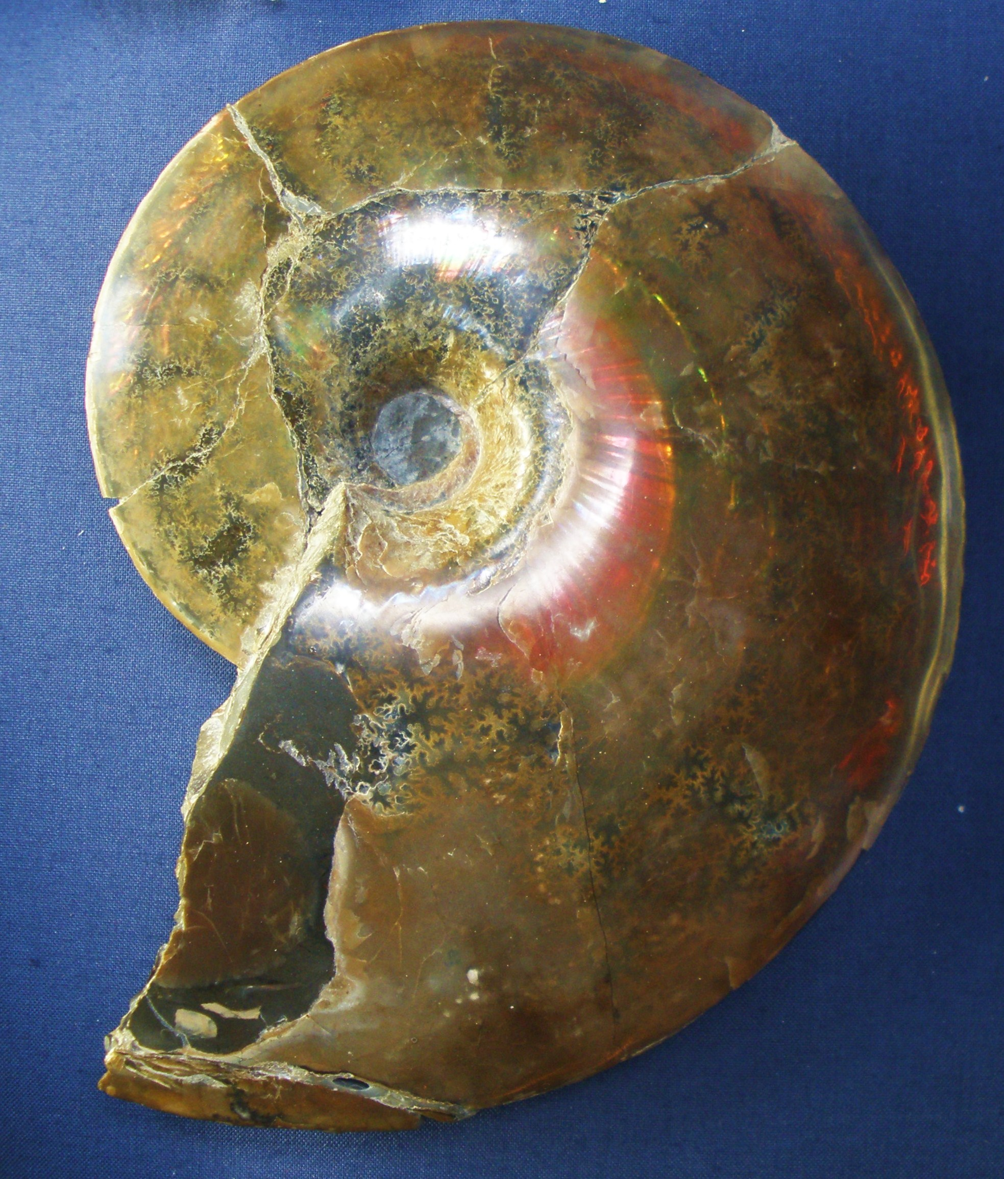 fossil Placenticeras meeki